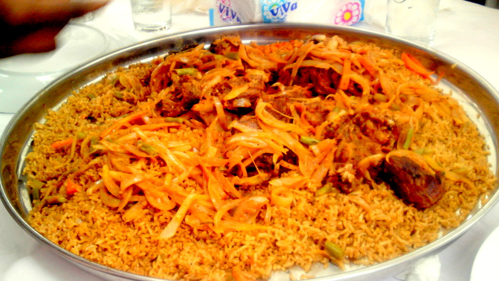 Riz gras à la viande de boeuf